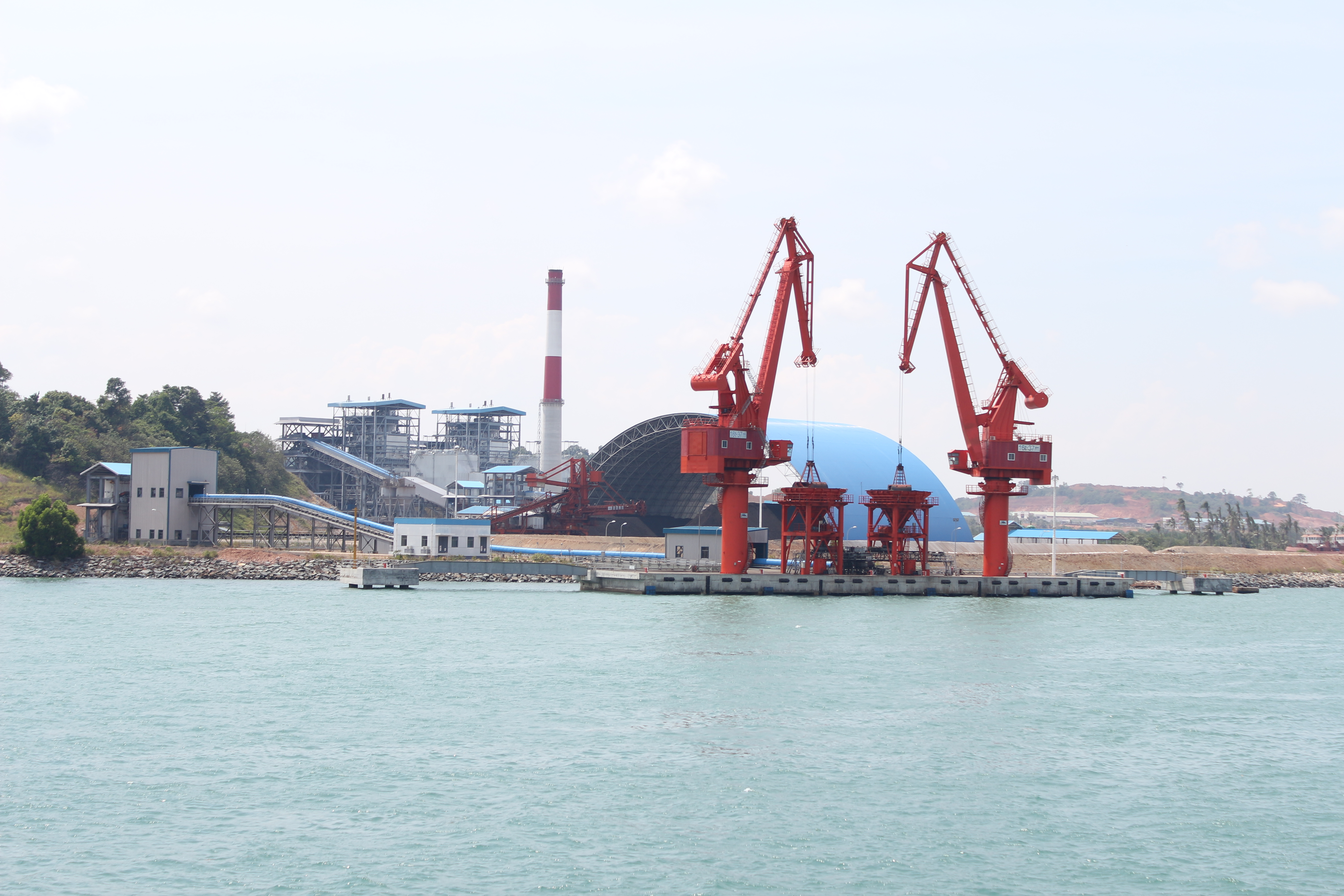 PLTU Batam